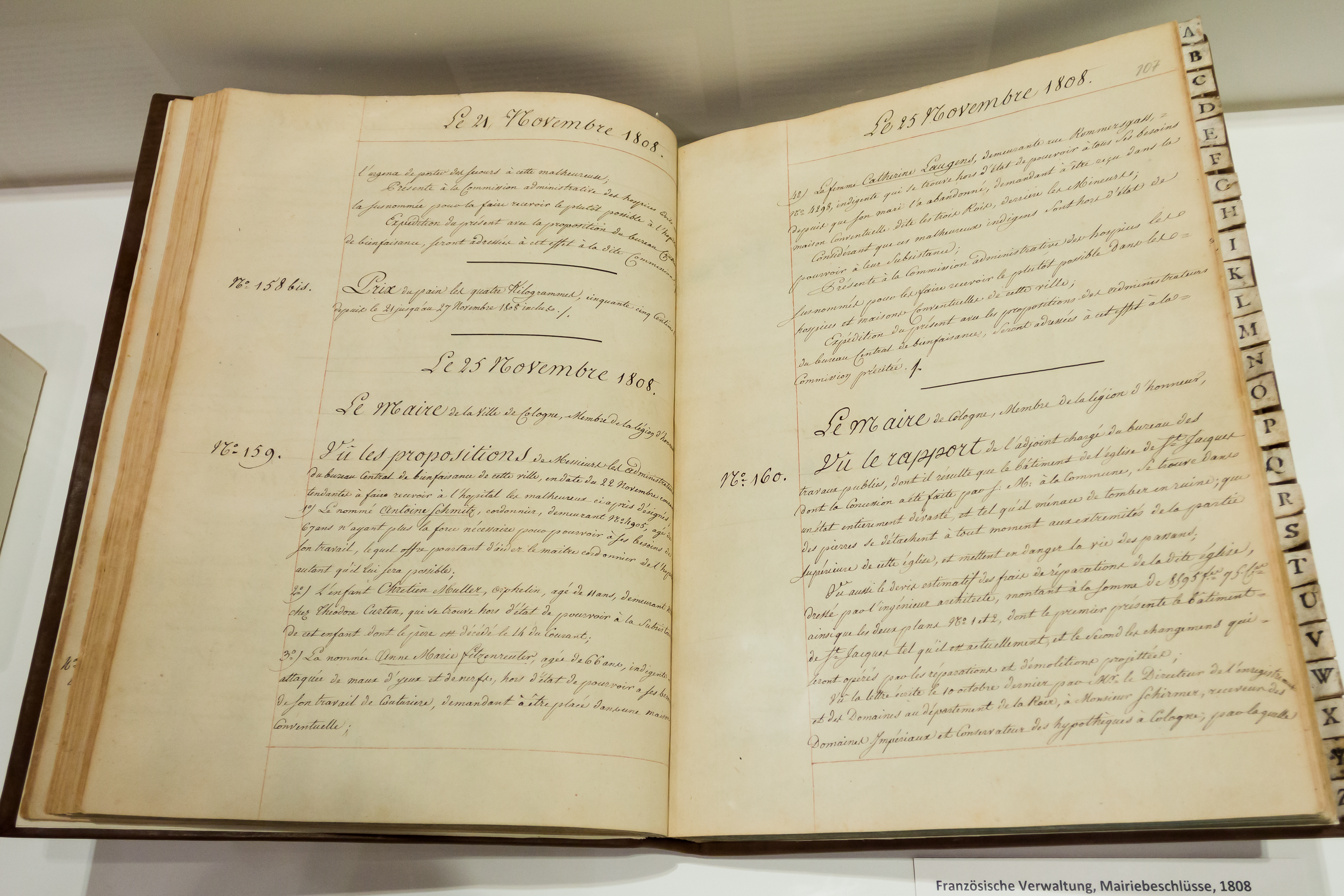 Ausstellung „Aufgepasst Patenkinder! – Ein Projekt für Vergangenheit und Zukunft“ des Historischen Archivs der Stadt Köln Foto: Französische Verwaltung, Mairiebeschlüsse, 1808. Bestand 350, 4473 Die Patenschaft zur Übernahme der Restaurierungskosten erfolgte durch den Rotary Club Köln-Kapitol.